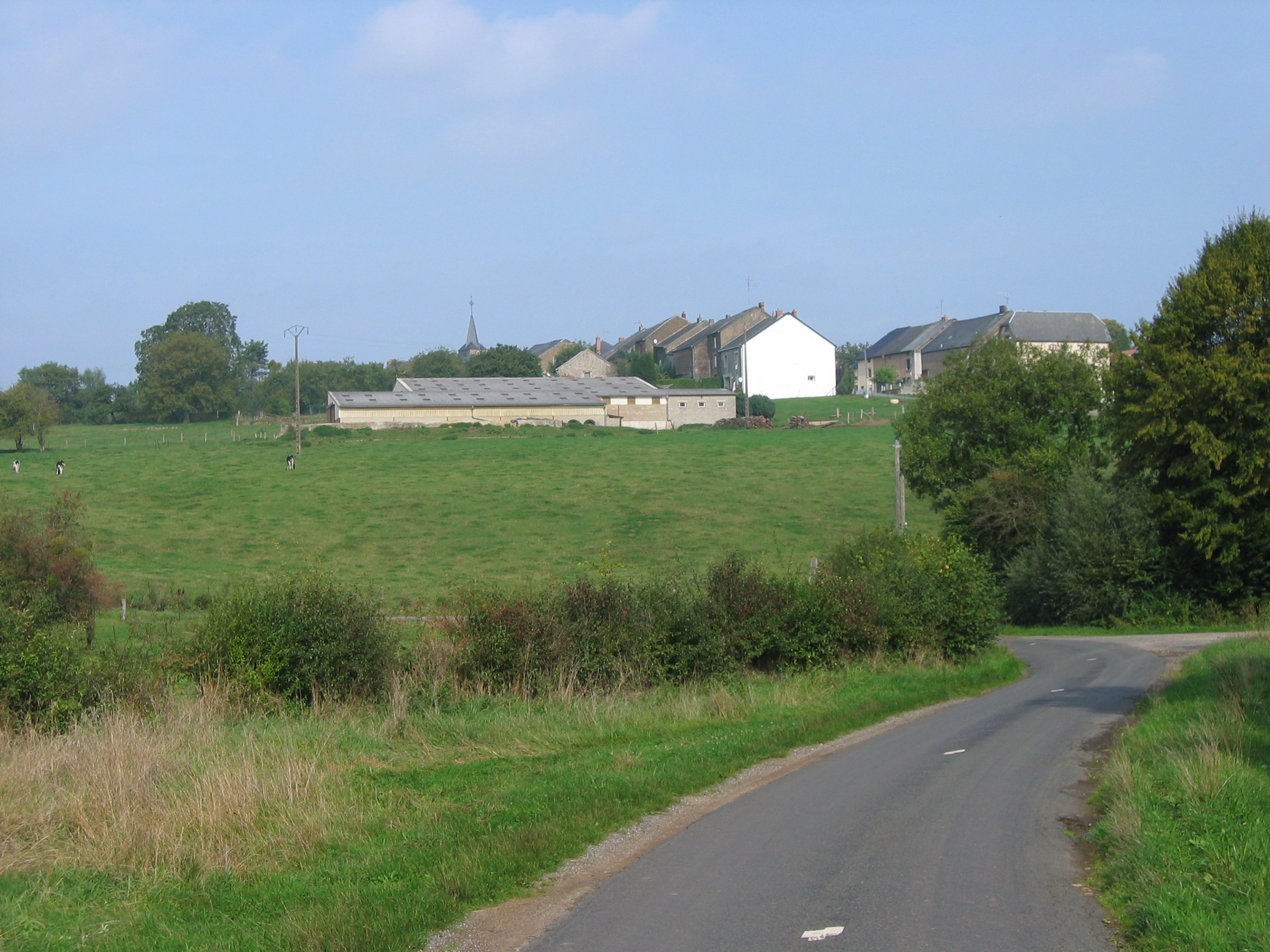 Vue du village de Margny, Ardennes, France